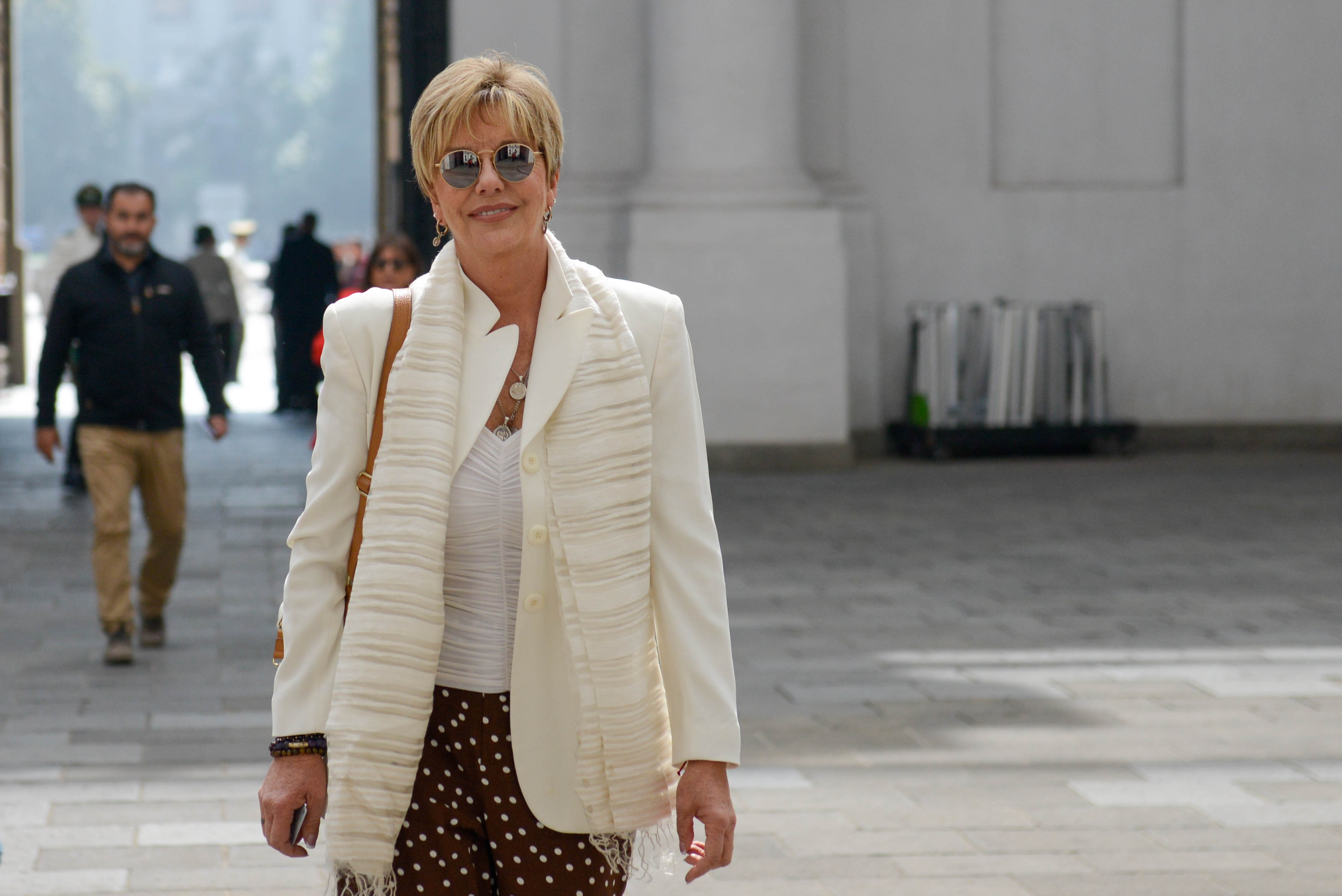 Ministra Cecilia Pérez encabeza la celebración del Día del Locutor